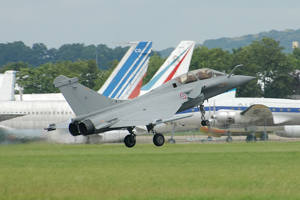 Dassault Rafale B